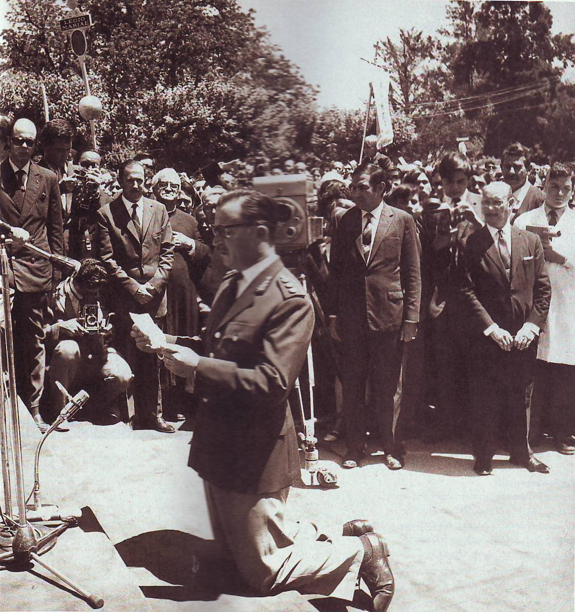 El dictador Juan Carlos Onganía rezando una plegaria durante un acto realizado en Luján